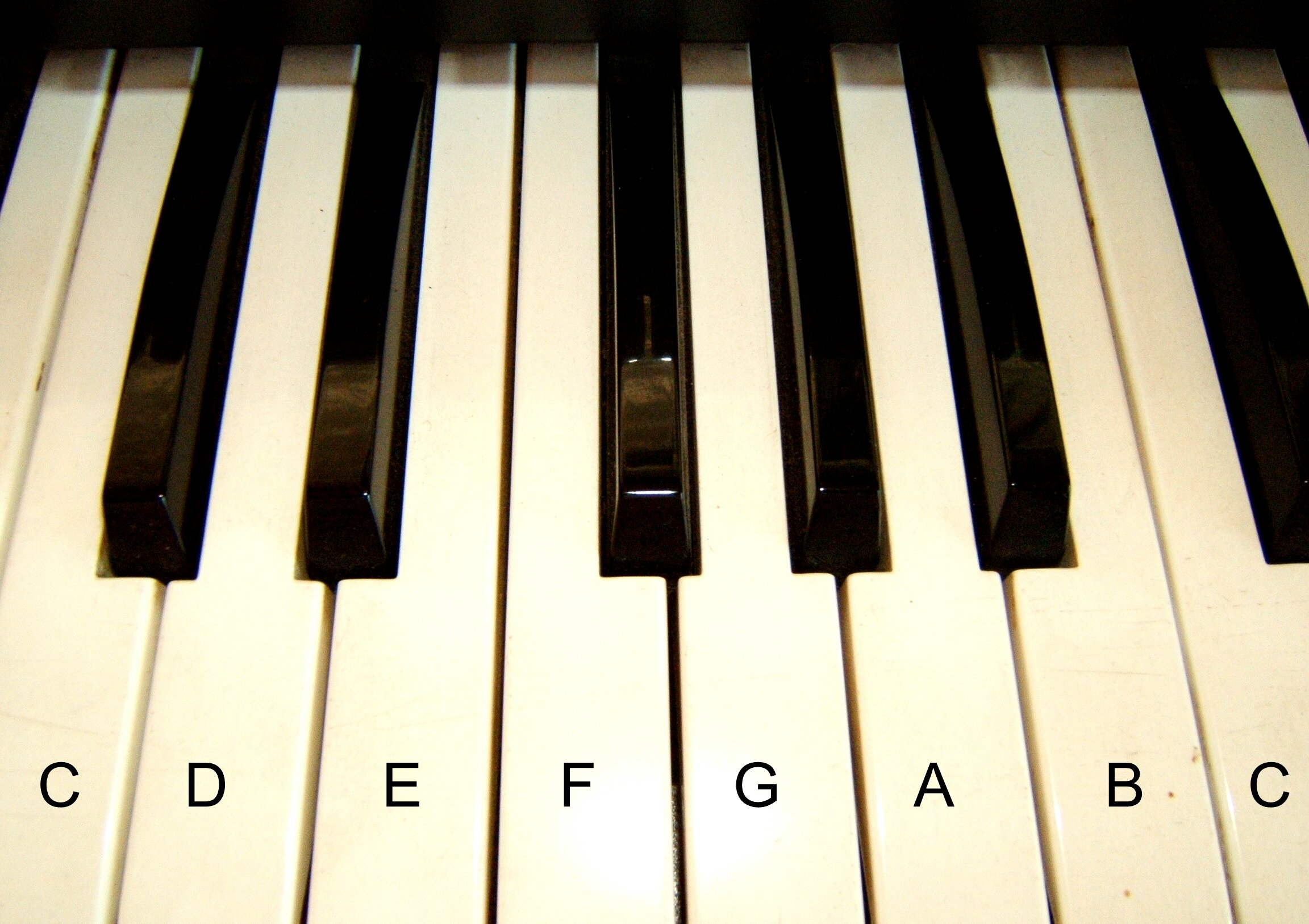 Voorbeeld van één octaaf op orgeltoetsen. Categorie:Afbeelding voorwerp